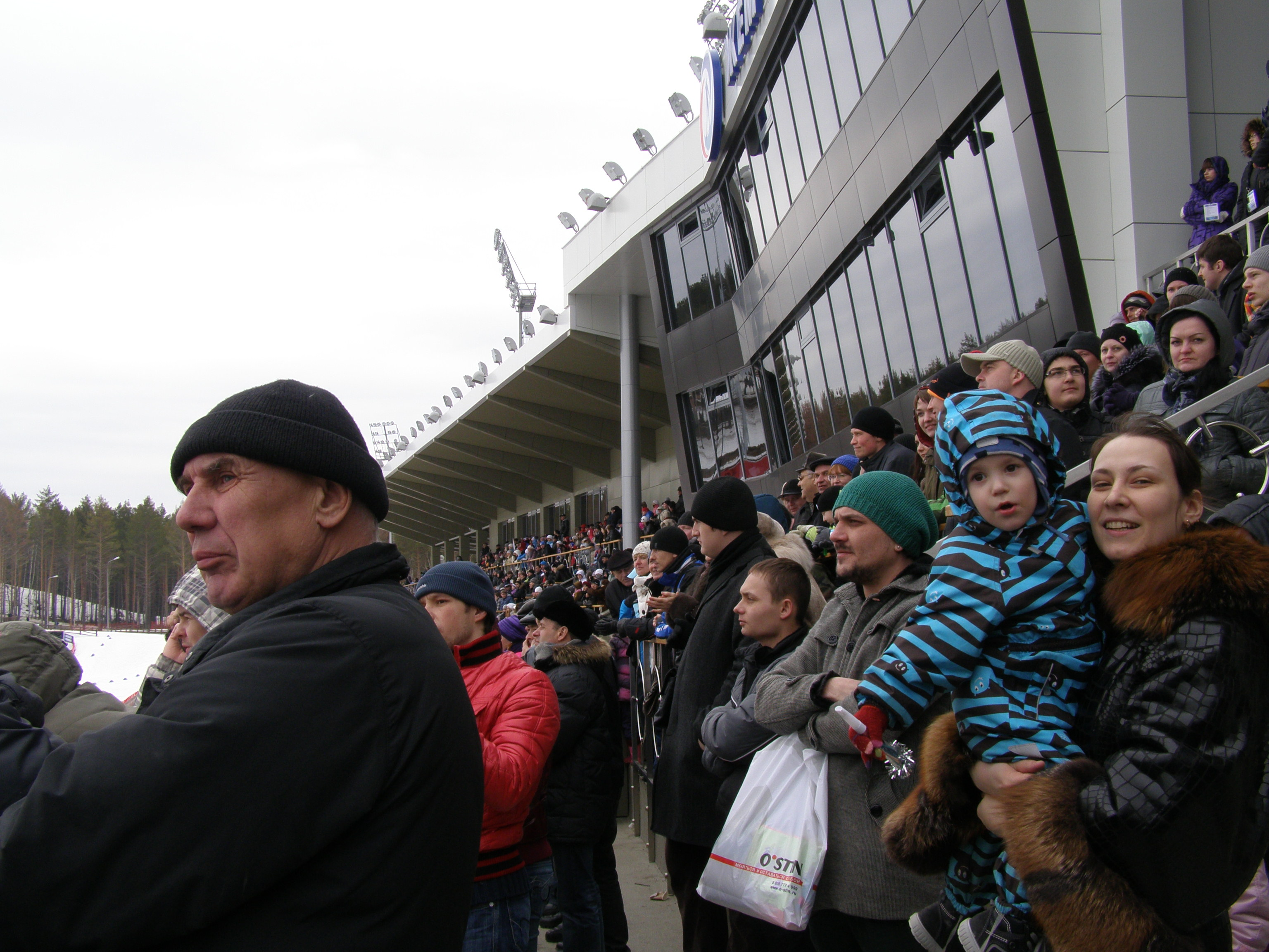 Ĉapmionkonkurso de Rusio pri Biatlono - 2012. La biatlona centro "Ĵemĉuĵina Sibiri" (Perlo de Siberio), Tjumena distrikto, Tjumena provinco, Rusio.